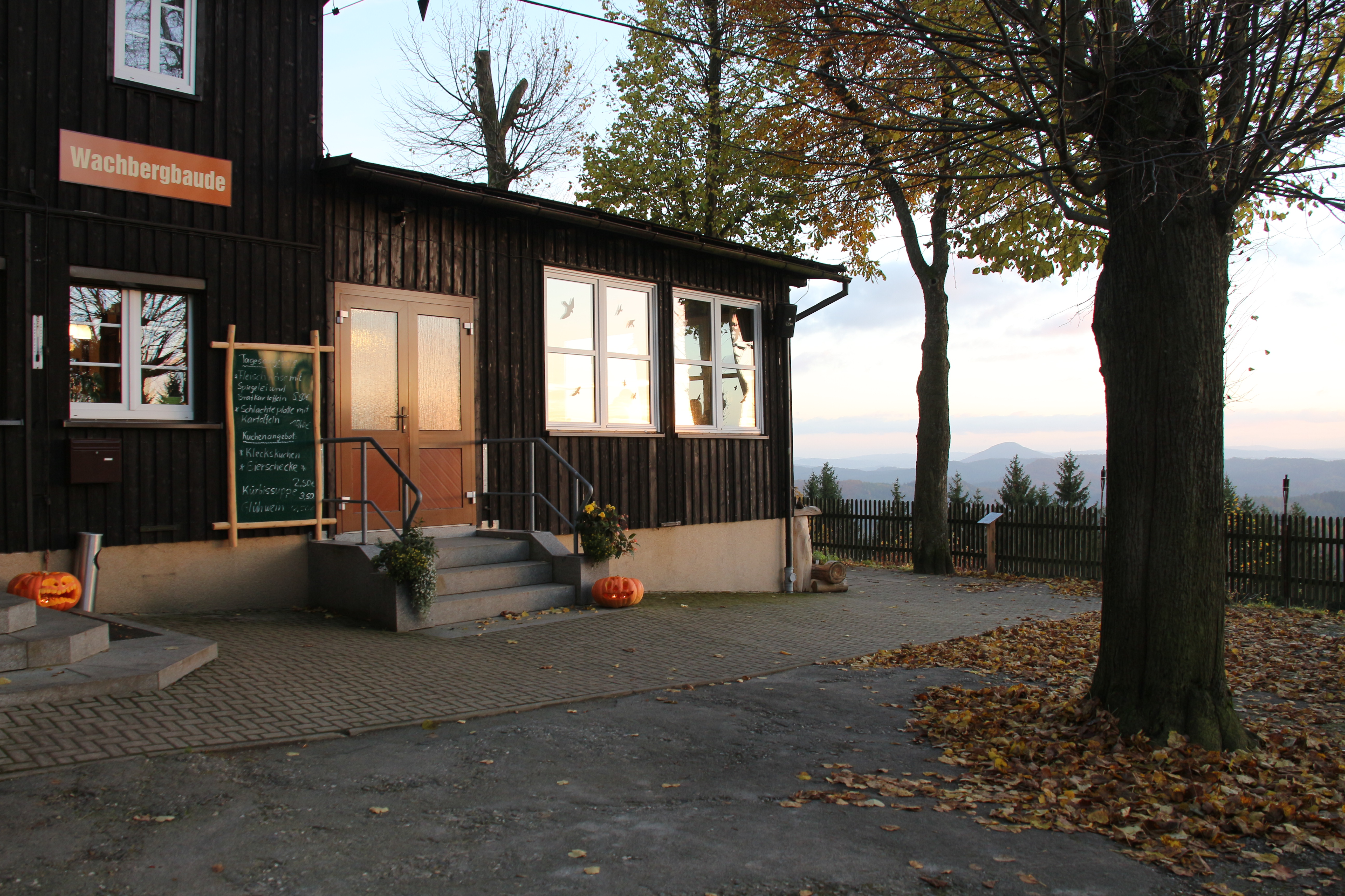 Wachbergbaude in 496 Meter Höhe. Hausberg von Saupsdorf. Panorama-Rundumblick vom Zittauer Gebirge über das Böhmische Mittelgebirge bis ins Osterzgebirge.